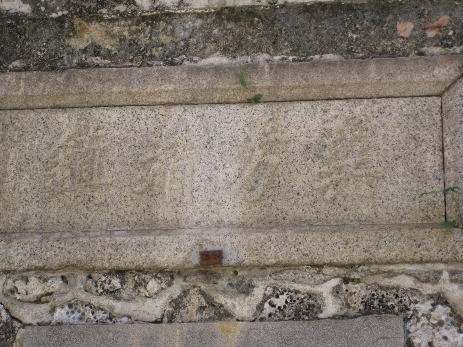 臺南巽方砲臺「巽方靖鎮」門額